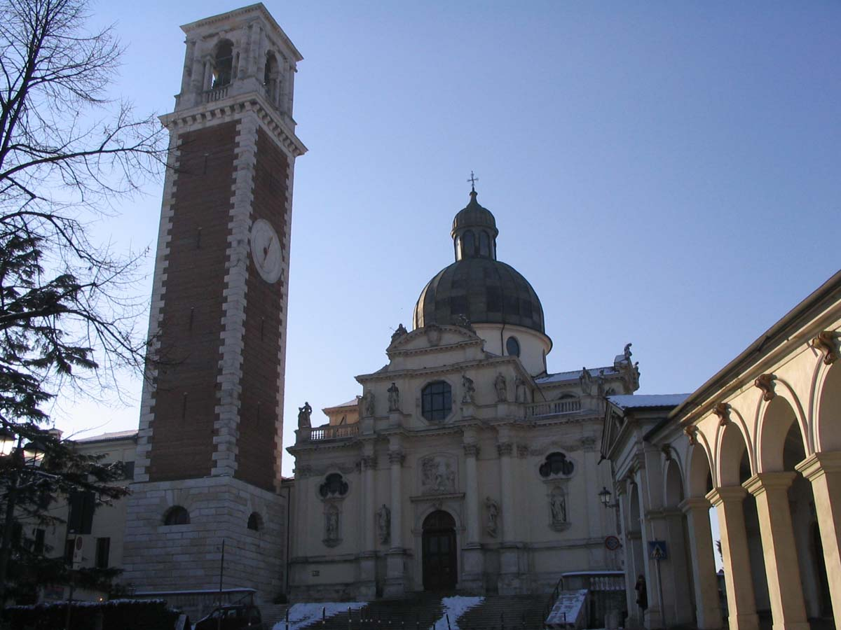 Il santuario della Madonna di Monte Berico fotografato dal Viale X Giugno